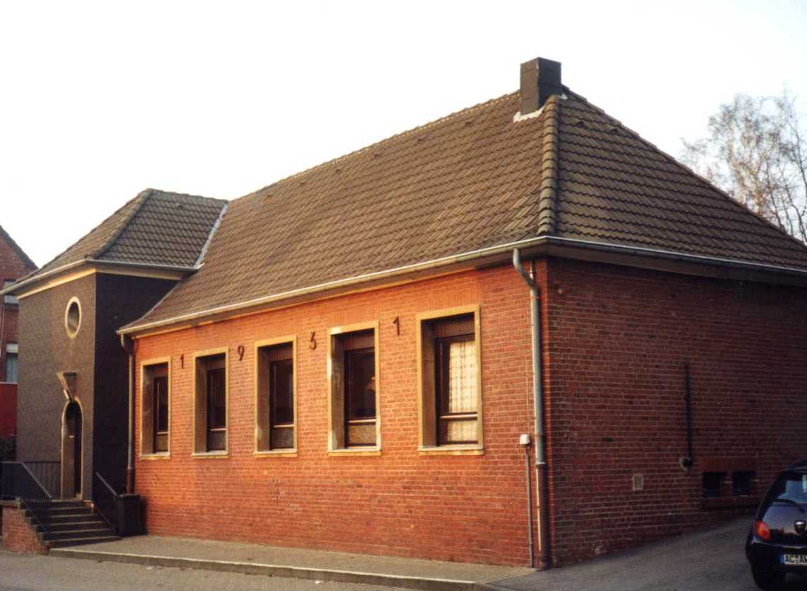 Pfarrheim von 1931 in Hastenrath